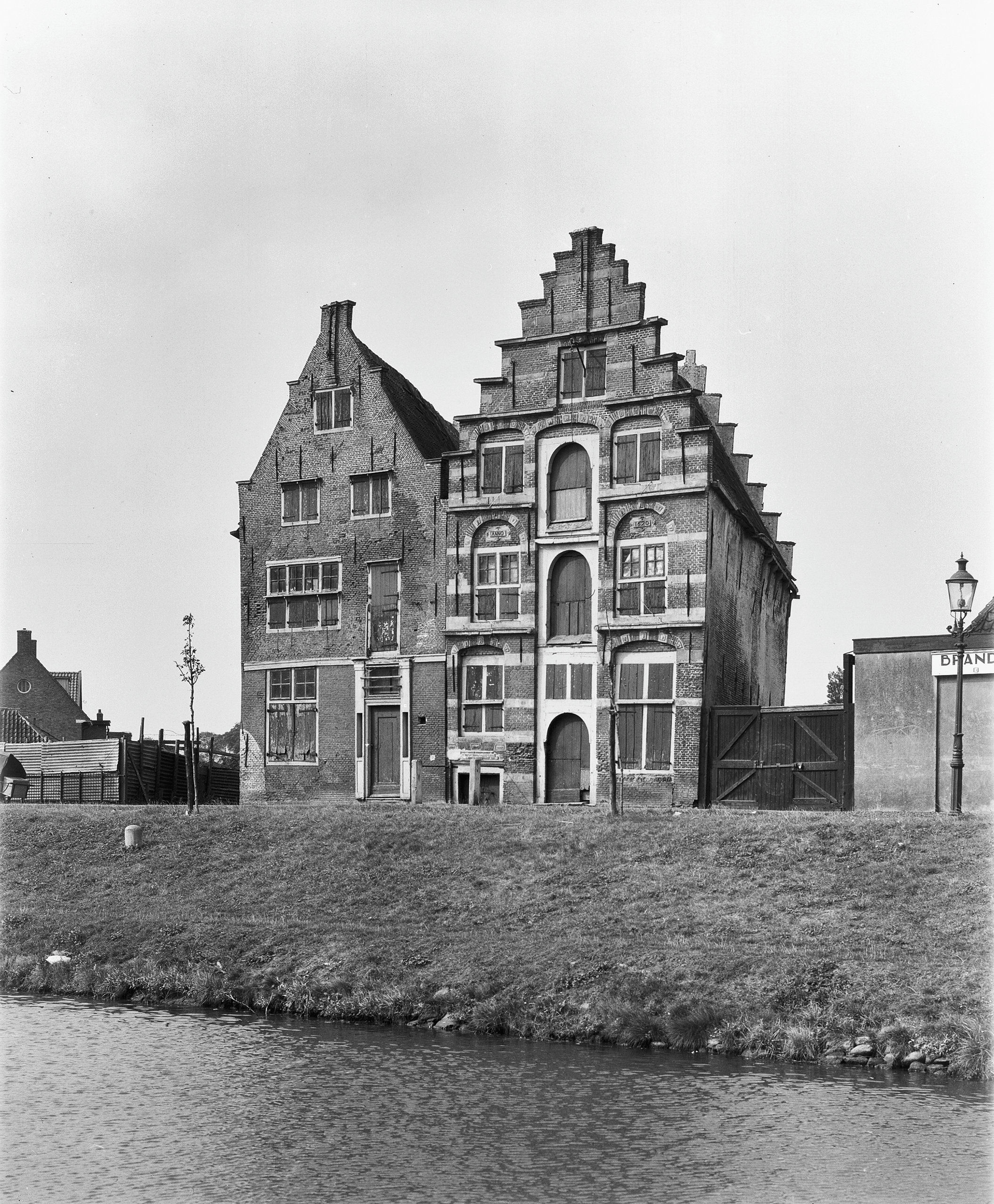 Waaigat - Westeinde: Waaigat, pakhuizen